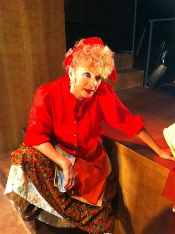 מוניקה ורדימון בהצגה הערשעלע אסטראפאליער